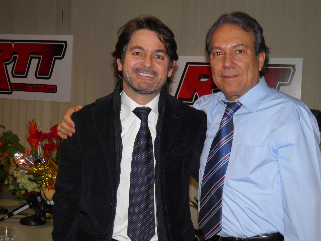 Oriol Pujol. "El jaroteo" RTT.